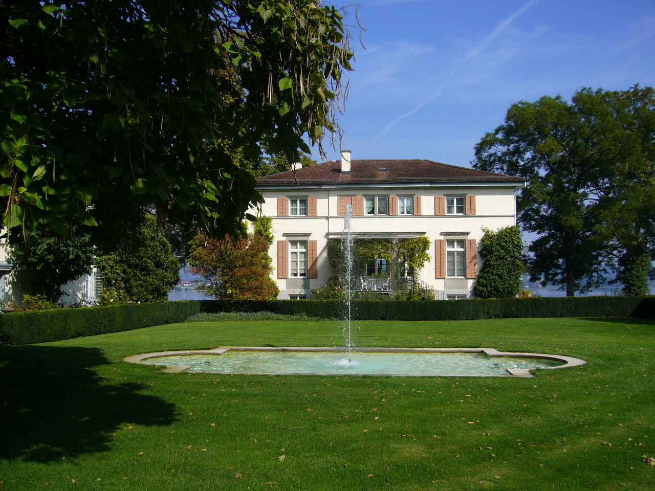 Villa Lilienberg in Ermatingen / Switzerland